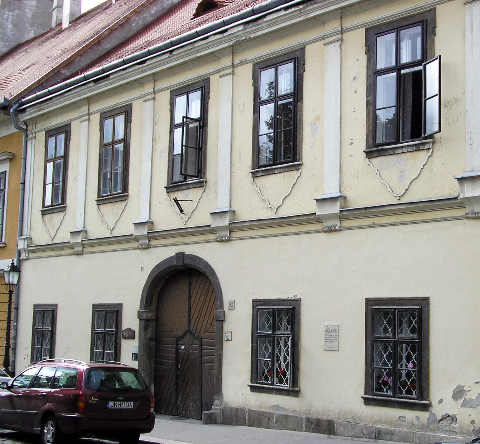 Emeletes barokk lakóház, 1760 körül. ID 81 - Magyarország, Budapest, I. kerület, Budai Várnegyed, Dísz tér, 10., Tóth Árpád sétány 8. This is a photo of a monument in Hungary. Identifier: 81